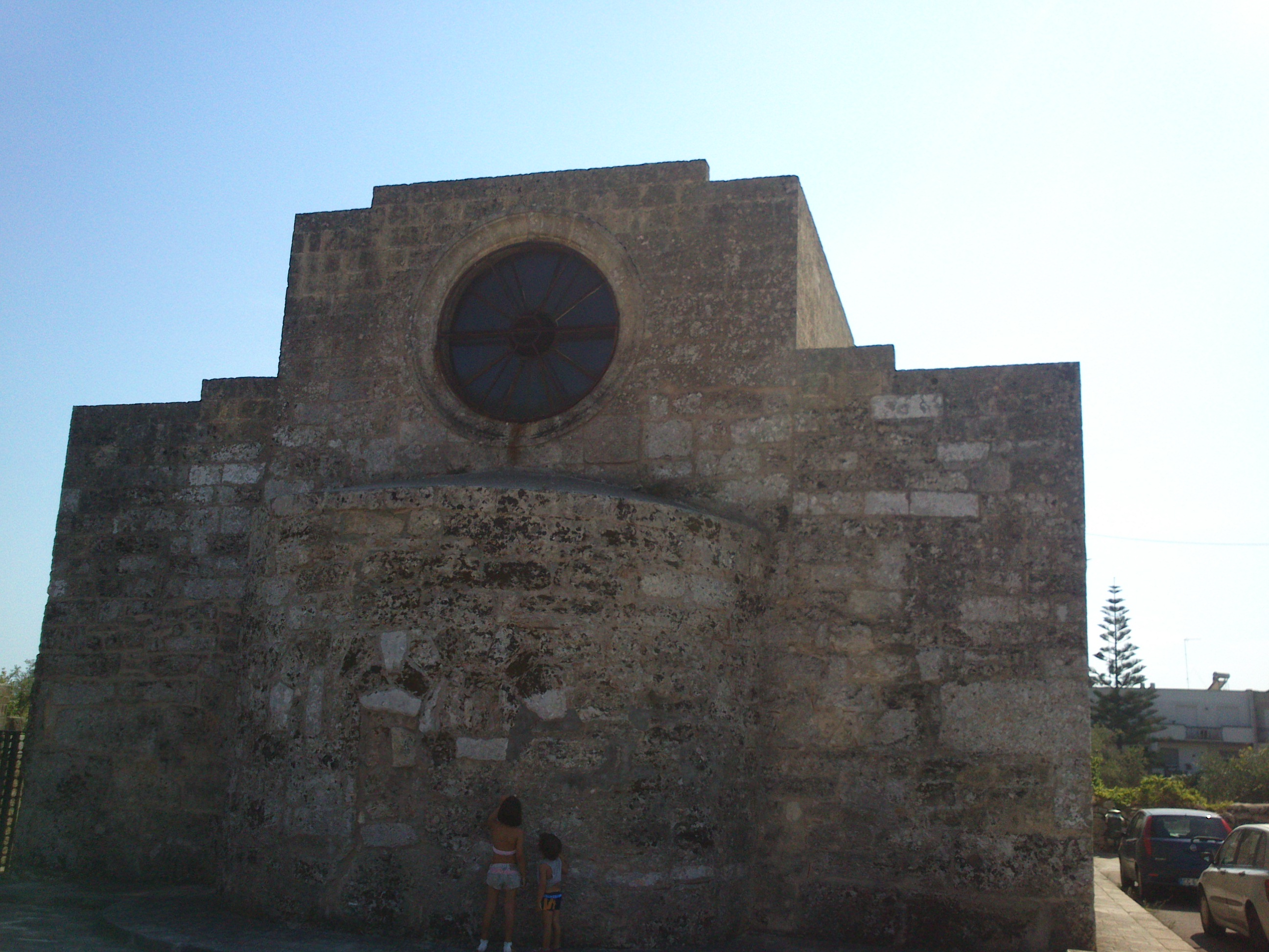 Esterno della Chiesa di San Giovanni Battista a Patù - Abside